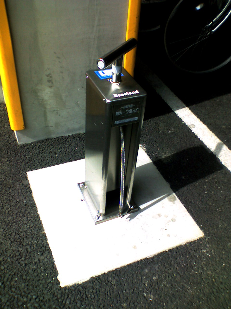 Bicycle pump